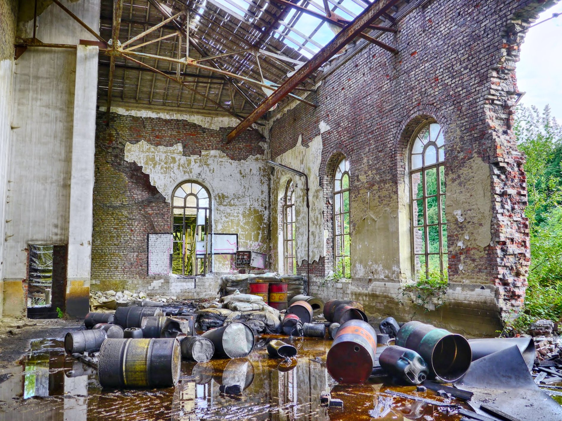 Altlast – Umweltbelastung durch Industrieöle (unsachgemäß entsorgte Ölgebinde) auf einer Industriebrache